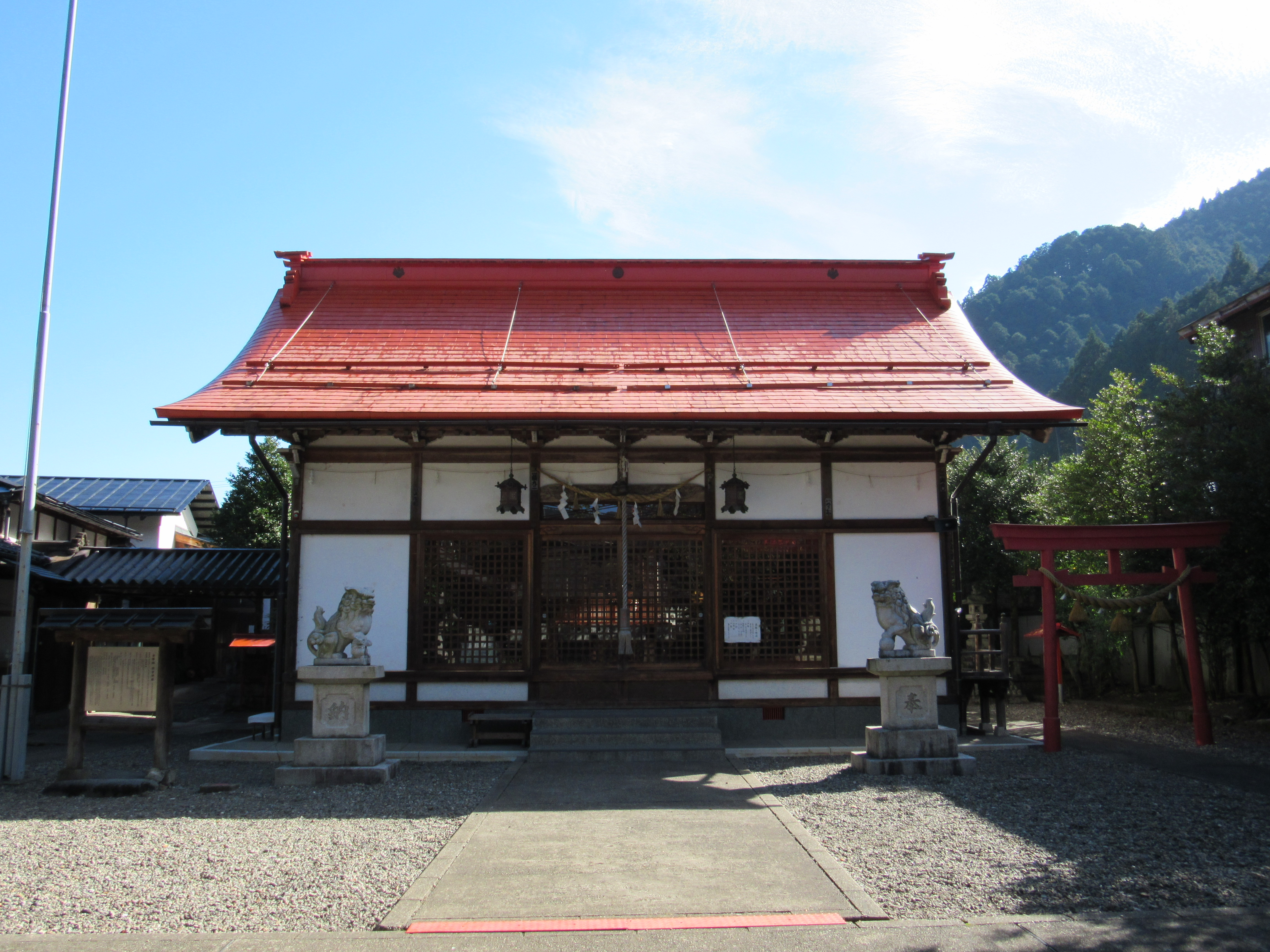 日吉神社本殿